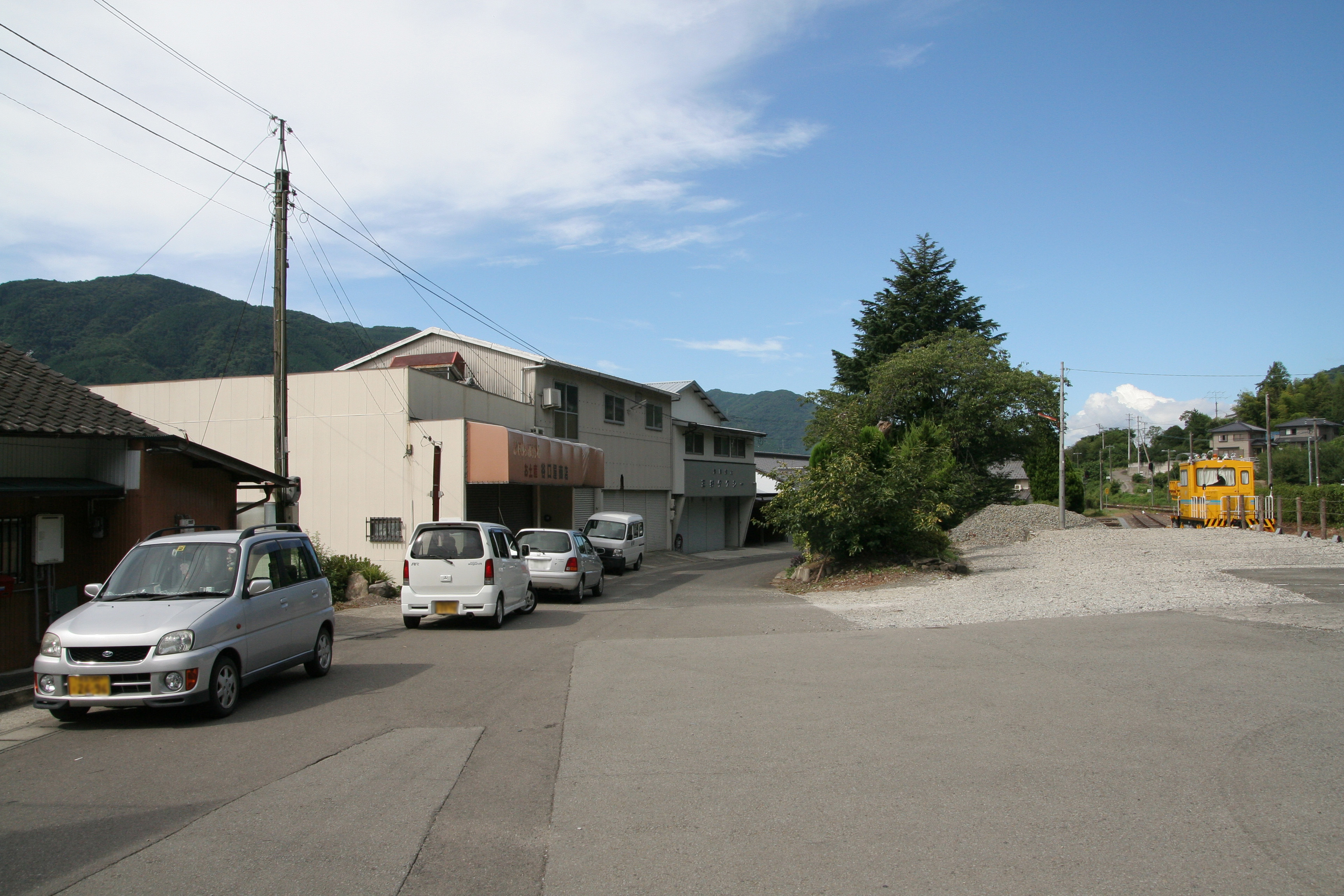 JR四国 箸蔵駅の駅前（駅周辺の様子）